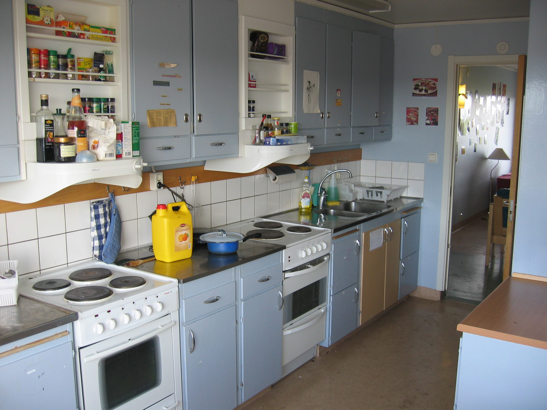 Kitchen in Flogsta Studentstaden